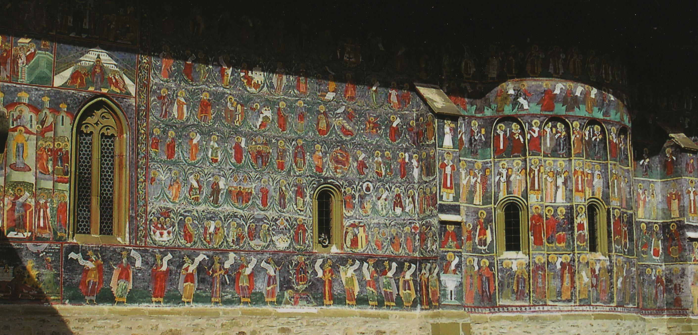 Sucevita: Kolostortemplom déli fala, "Jesse fájának" falképével.Kit36 Licensing Felv.: K. Simon Ildikó (családi képarchivum) 2003.10.02.KYOCERA 3SL. Szerk.: Kiss T. 2006.12.20.(képkivágás) 01